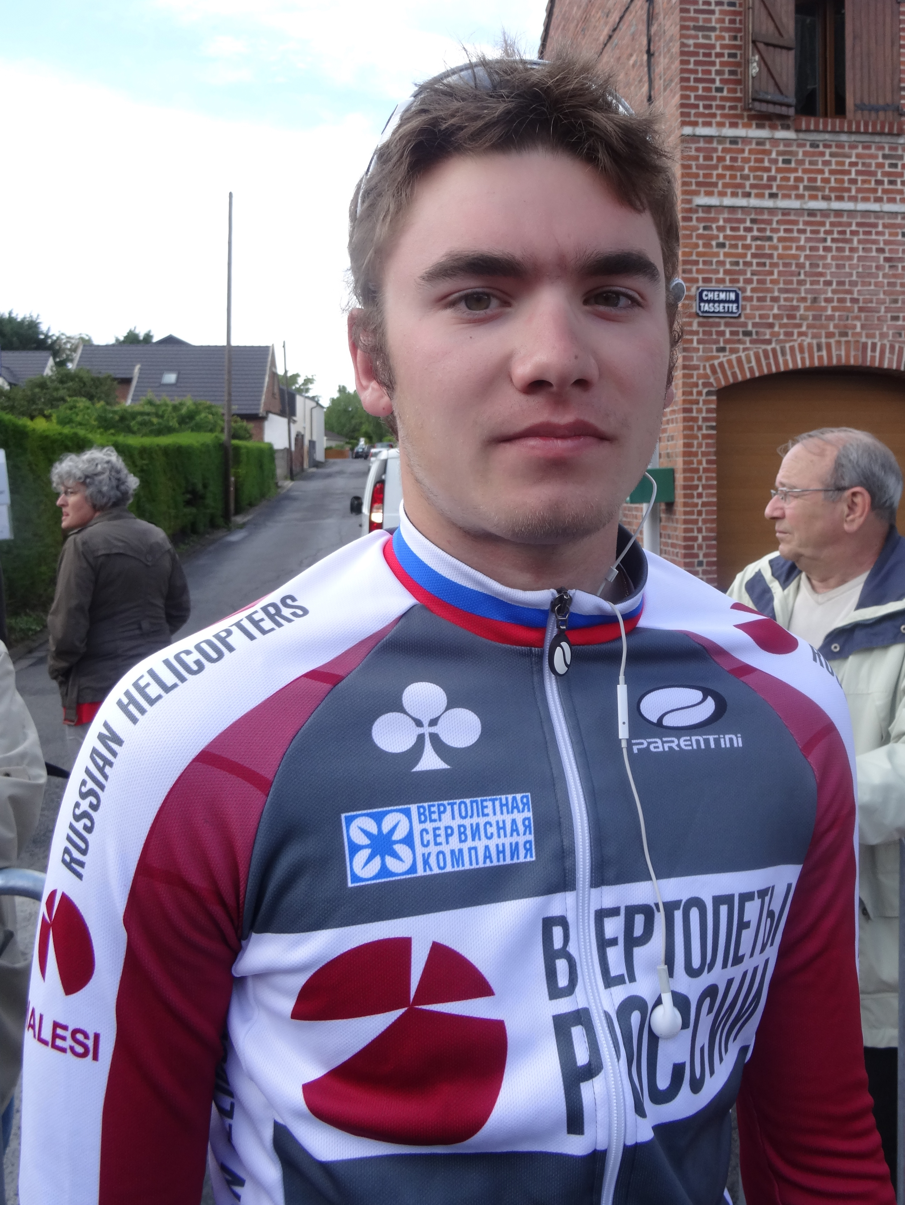 Reportage photographique réalisé le vendredi 23 mai 2014 à l'occasion du départ de la première étape du Paris-Arras Tour 2014 à Lens, Pas-de-Calais, Nord-Pas-de-Calais, France. Depicted person: Andrey Sazanov Depicted team: Russian Helicopters